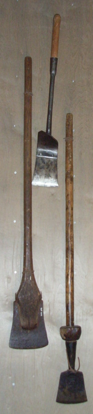 Barkespadar utstilte på Norsk skogmuseum på Elverum